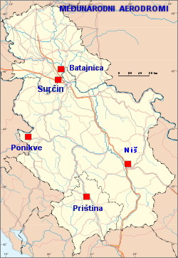 Međunarodni aerodromi u Srbiji, Niš, oktobar 2009.